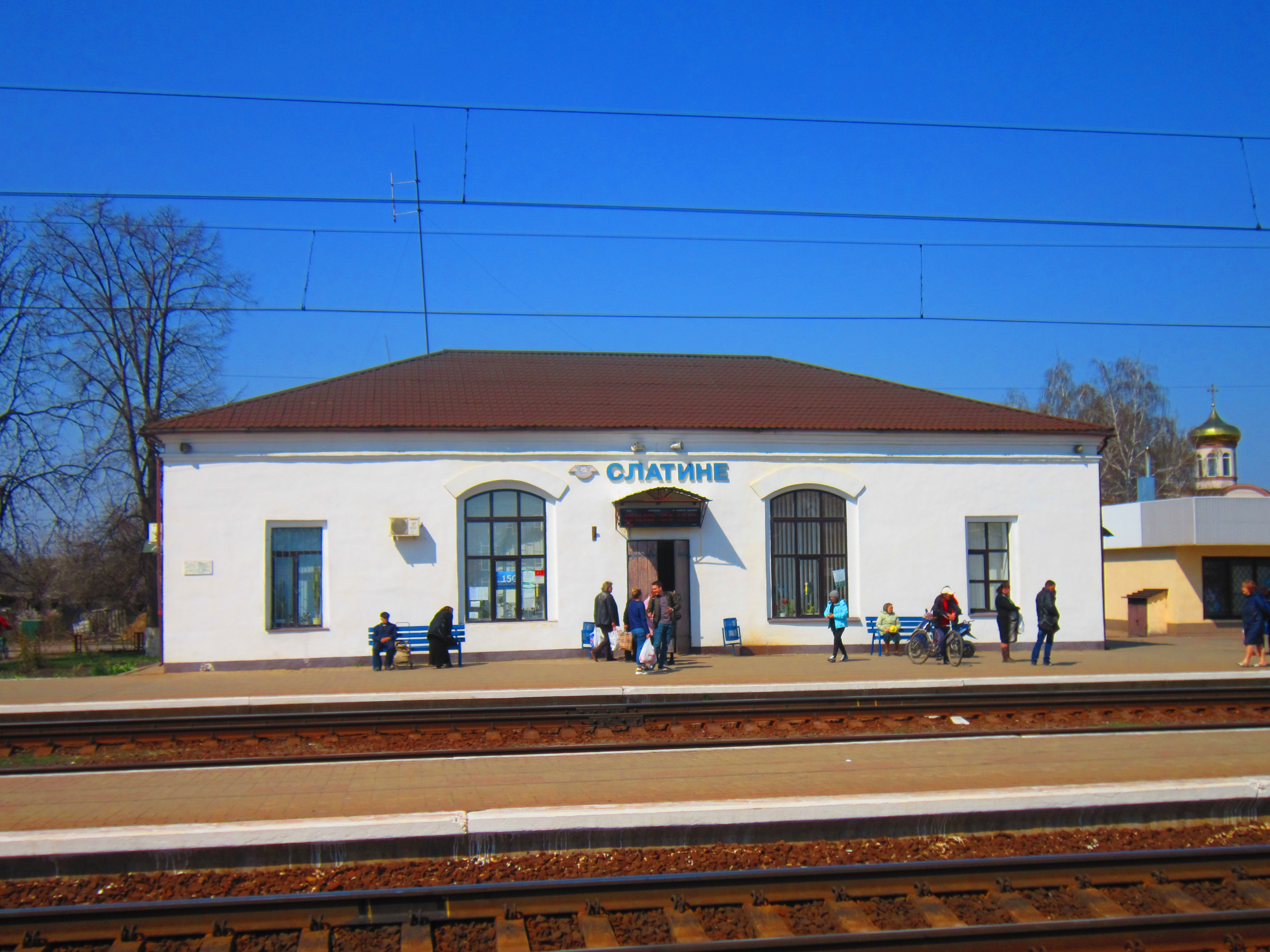 Зображення Слатинської залізничної станції